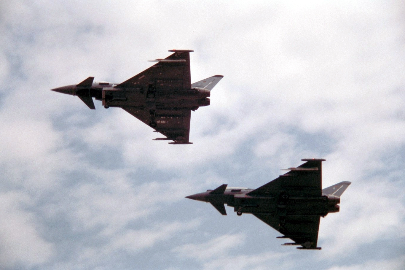 Eurofighter in Rottenformation, fotografiert beim Familientag Manching 2006. Oben Einsitzer, unten Zweisitzer.